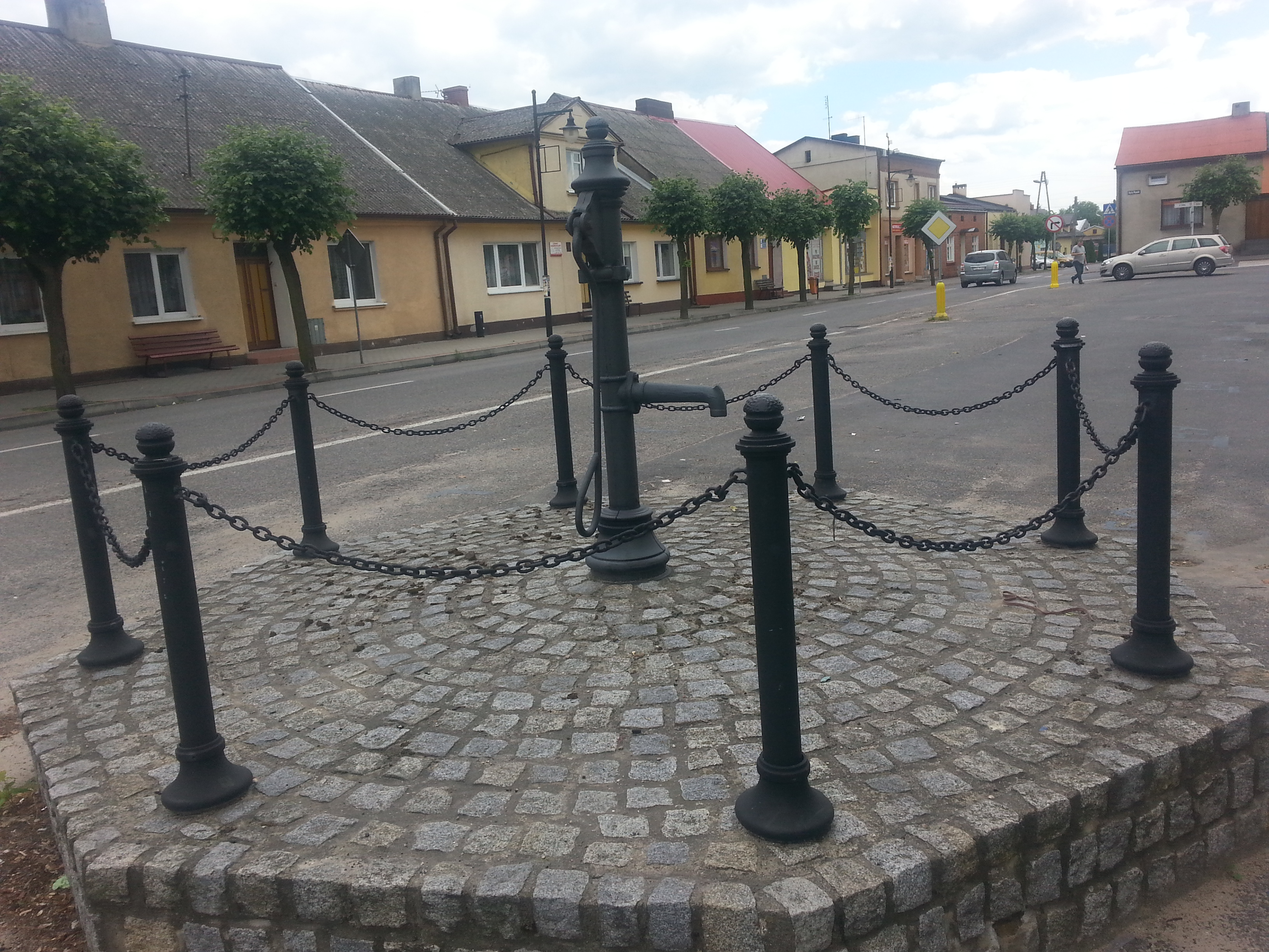 Stara pompa na Dużym Rynku w Zagórowie